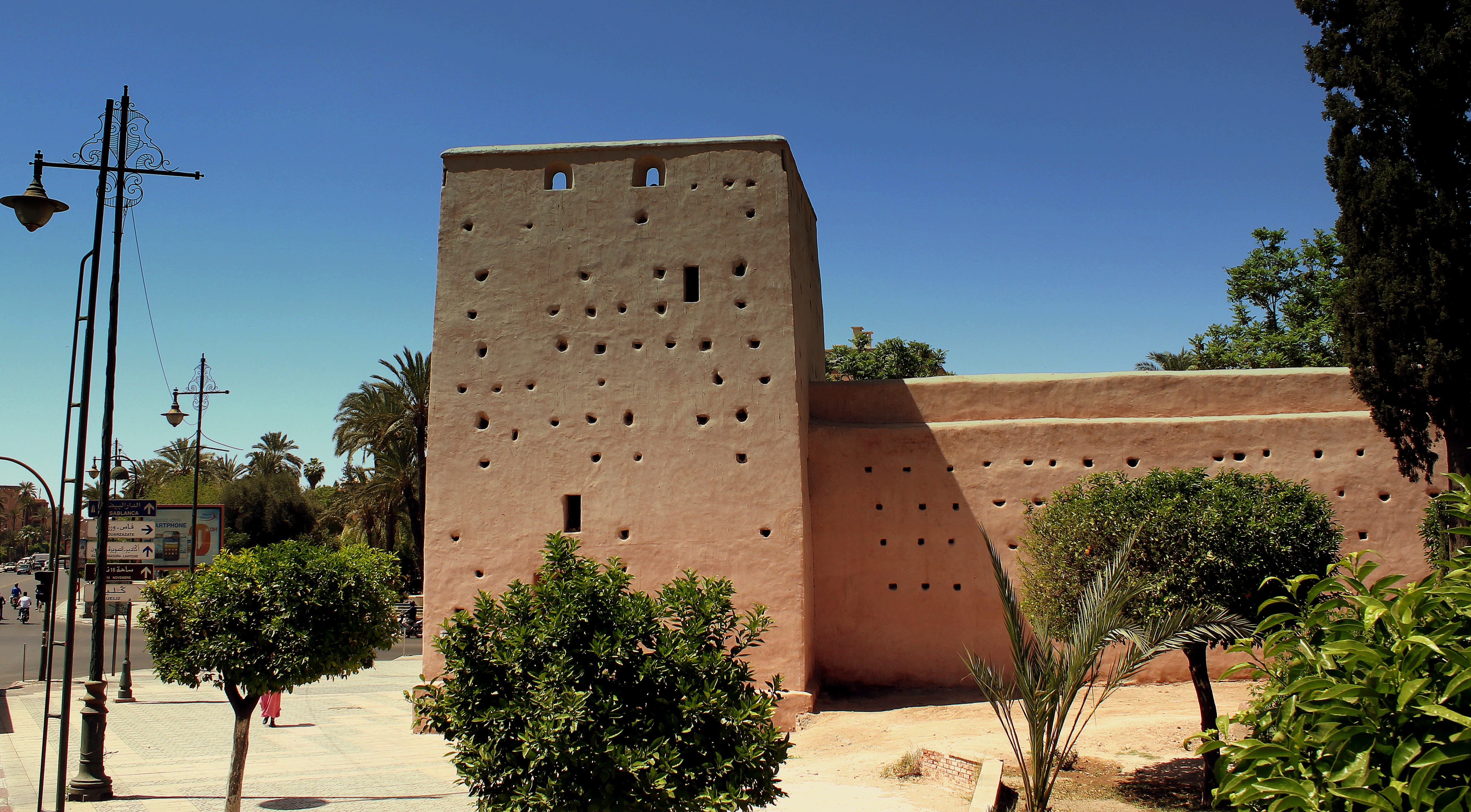 CITY WALLS MARRAKECH MOROCCO APRIL 2013